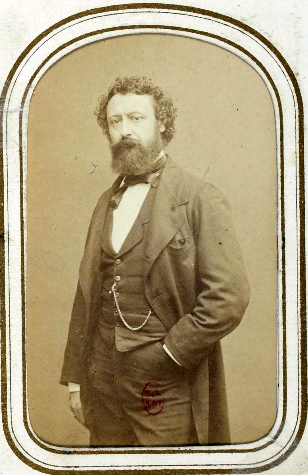 [Recueil. Personnalités des arts et des lettres] : vue 40 - F. 17v. Jean Pastelot (Carjat phot.)